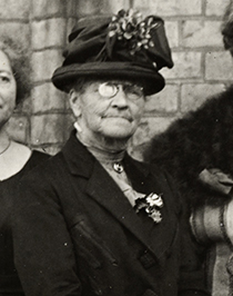 Tittel / Title: Det internasjonale kvinneråds møte, Stortinget Beskrivelse / Description: Pauline Chaponnière-Chaix var president for ICW fra 1920-1922. Dato / Date: ca 1920 Fotograf / Photographer: ukjent / unknown Sted / Place: Oslo, Stortinget Eier / Owner Institution: Nasjonalbiblioteket / National Library of Norway Lenke / Link: Bildesignatur / Image Number: blds_05885